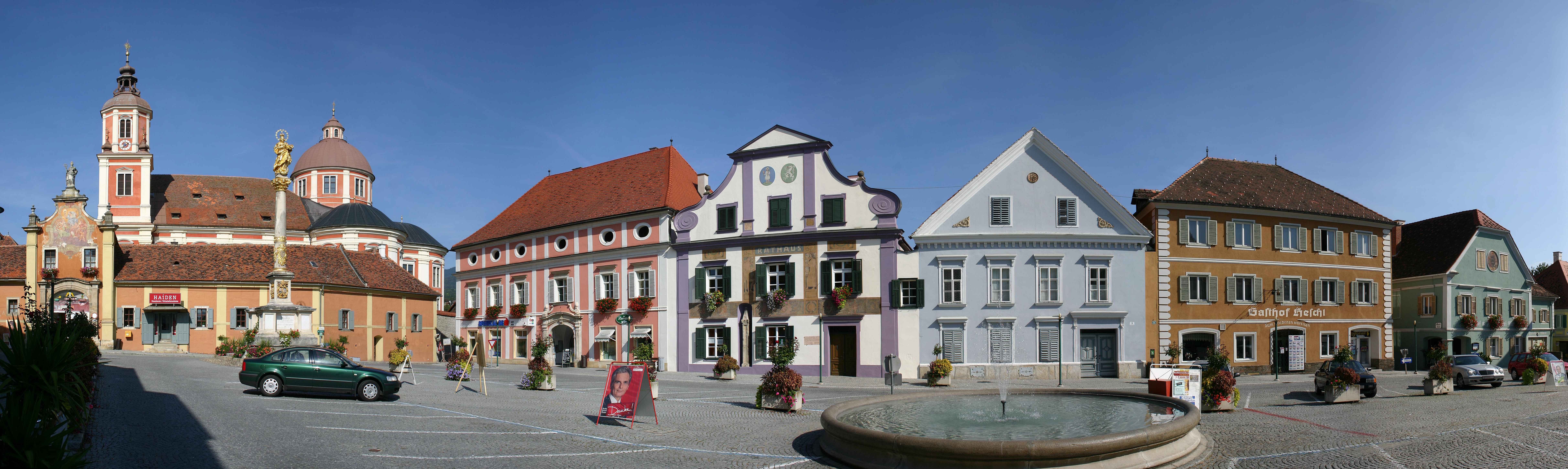 Pöllau – Panoramabild des Hauptplatzes (zusammengesetzt aus 7 Einzelbildern)